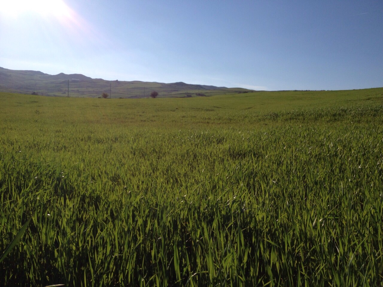 Campo aperto coltivato a grano timilia nell'aprile del 2014